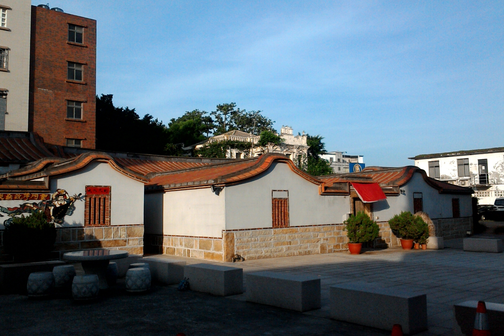 邱良功古厝,福建省金門縣金城鎮北門里